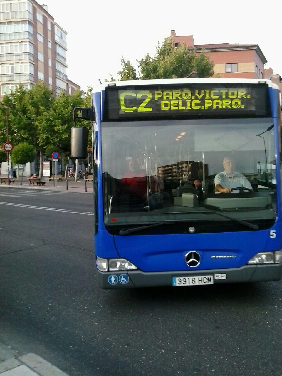 Mercedes Benz Citaro Auvasa